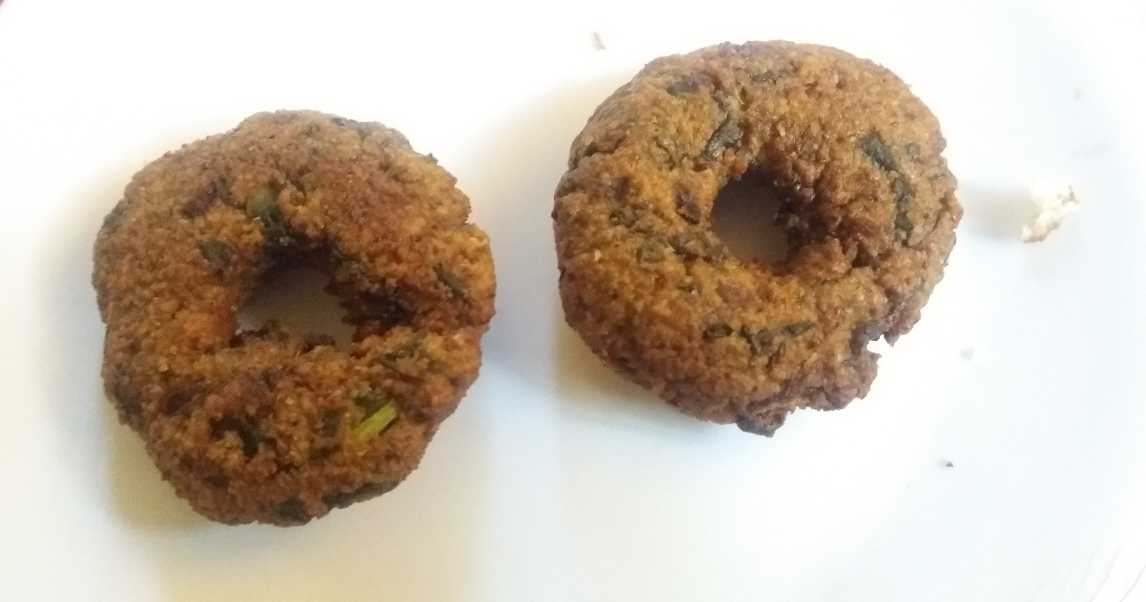 नेपाली: माघे संक्रान्तिमा नेपाली समुदायमा प्रचलित खाने खाना वा रोटीको एक परिकार